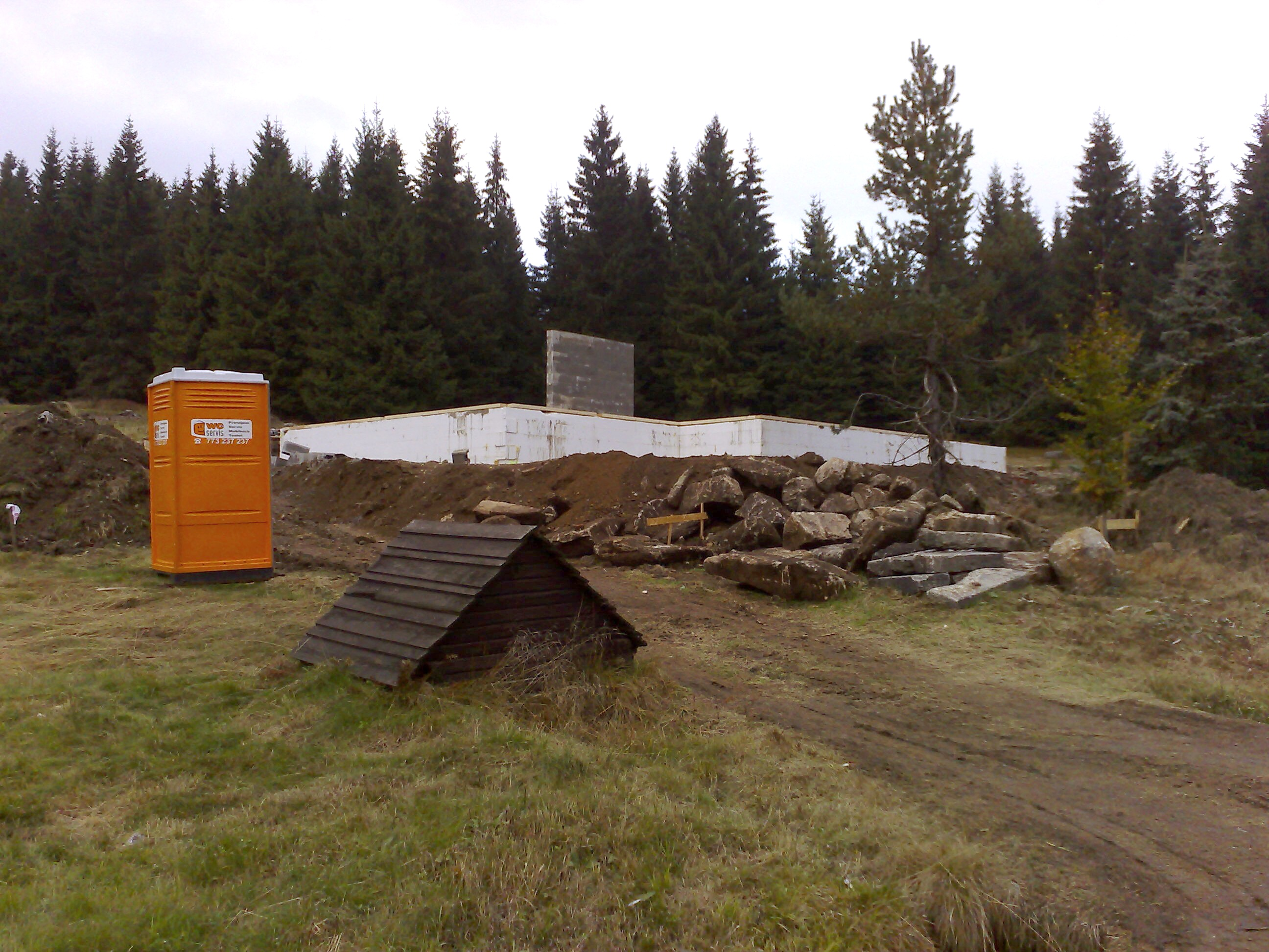 Zbouraný dům č. p. 65 v Mariánskohorských boudách a stavba základů nového objektu. Novým vlastníkem je Pavel Bém.